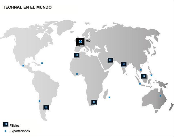 Mundo